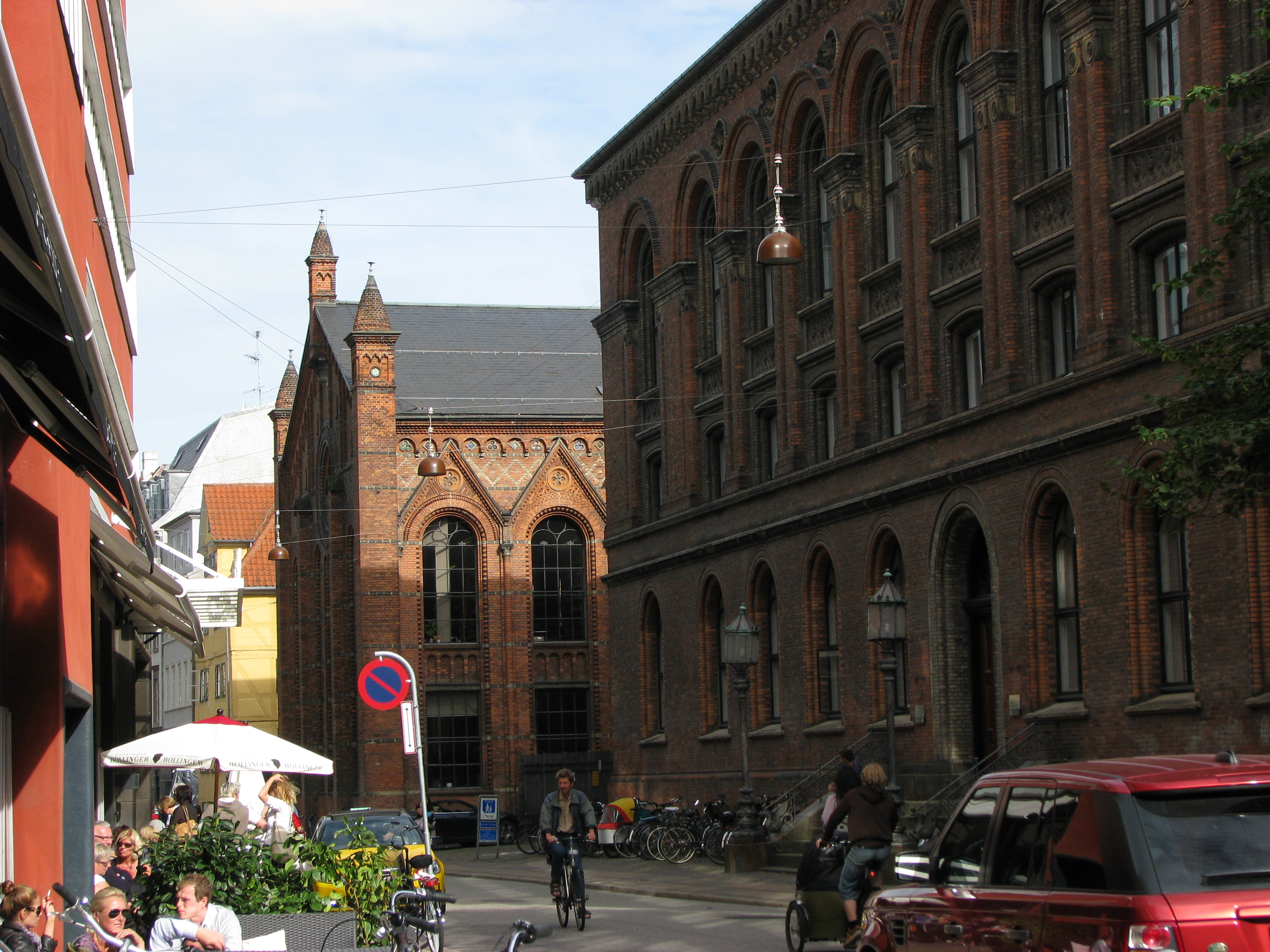 Krystalgade in Copenhagen, Denmark